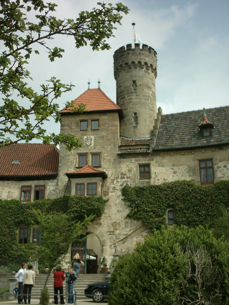 Schloss Hohenstein bei Coburg, Westflügel mit Bergfried Quelle: selbst fotografiert Fotograf/Zeichner: presse03 Datum: 14.05.2006